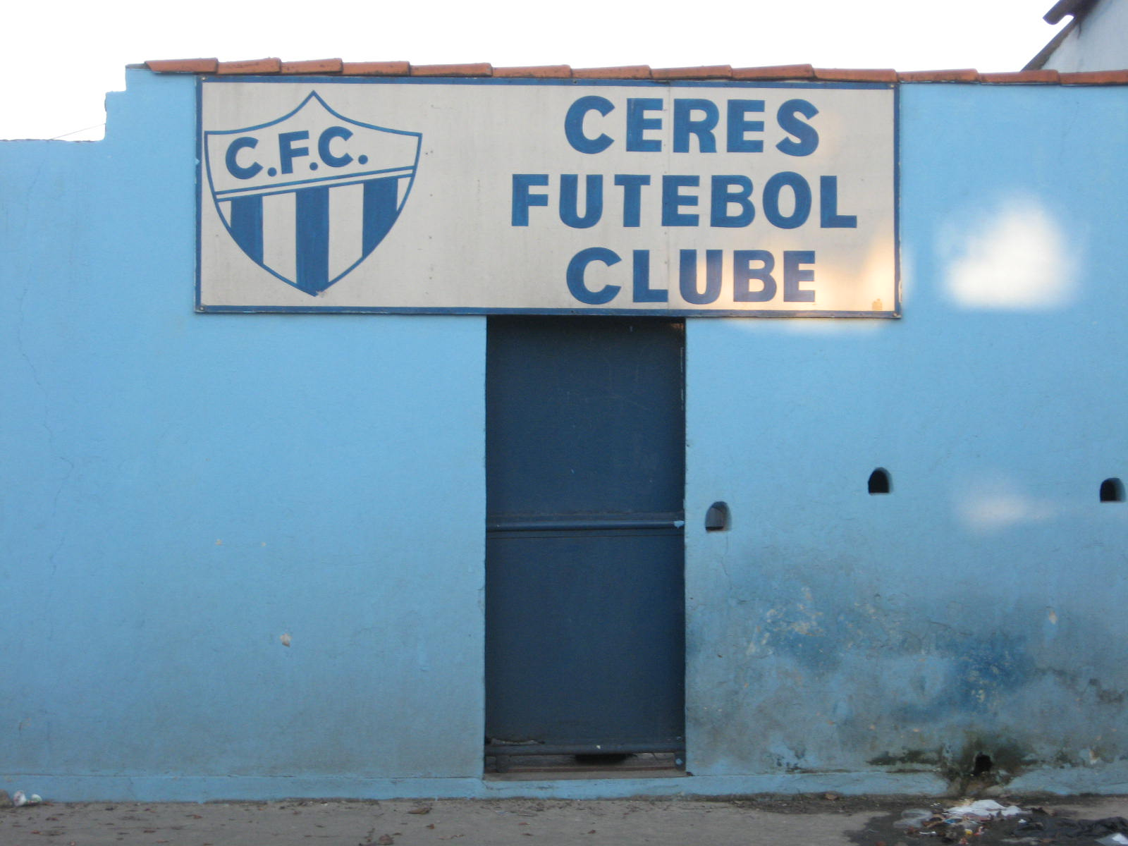 Céres Futebol Clube